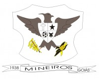 Brasão de Armas do município de Mineiros, Goiás, Brasil.